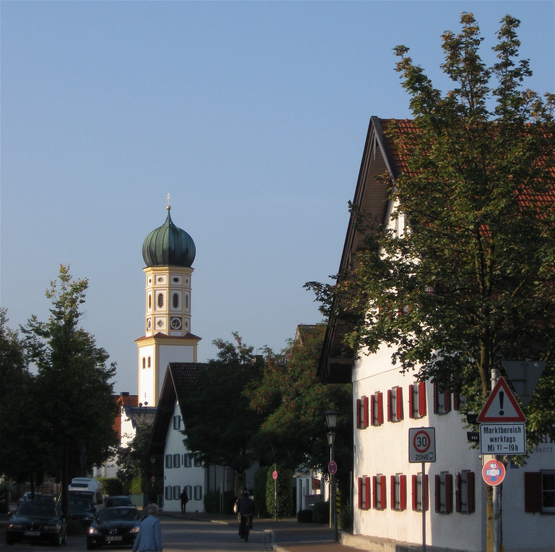 Ensemble Großhadern. Das Dorf wurde im Jahre 1065 erstmals urkundlich erwähnt. Die Barockkirche St. Peter bildet zusammen mit einer fast geschlossenen Gruppe giebelständiger Bauernhäuser des 19. Jahrhunderts ein malerisches Bild, das zu den einprägsameren innerhalb des Münchener Burgfriedens gerechnet werden kann.